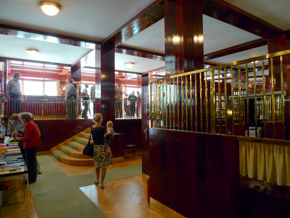 Looshaus, Haus Goldman & Salatsch